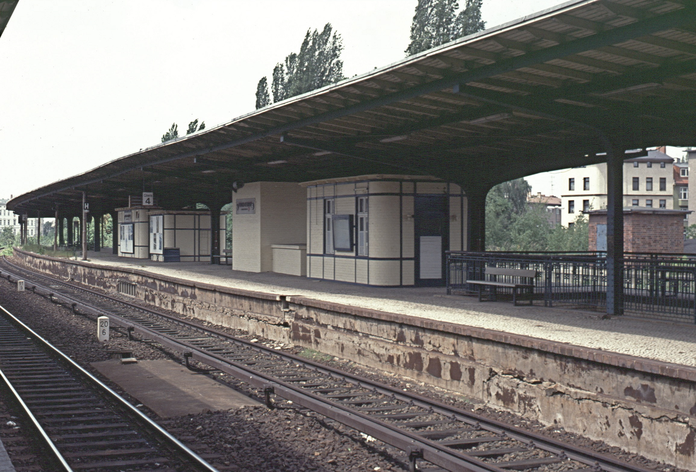 S-Bahnsteig Berlin-Spandau (seit 1998: Berlin-Stresow)